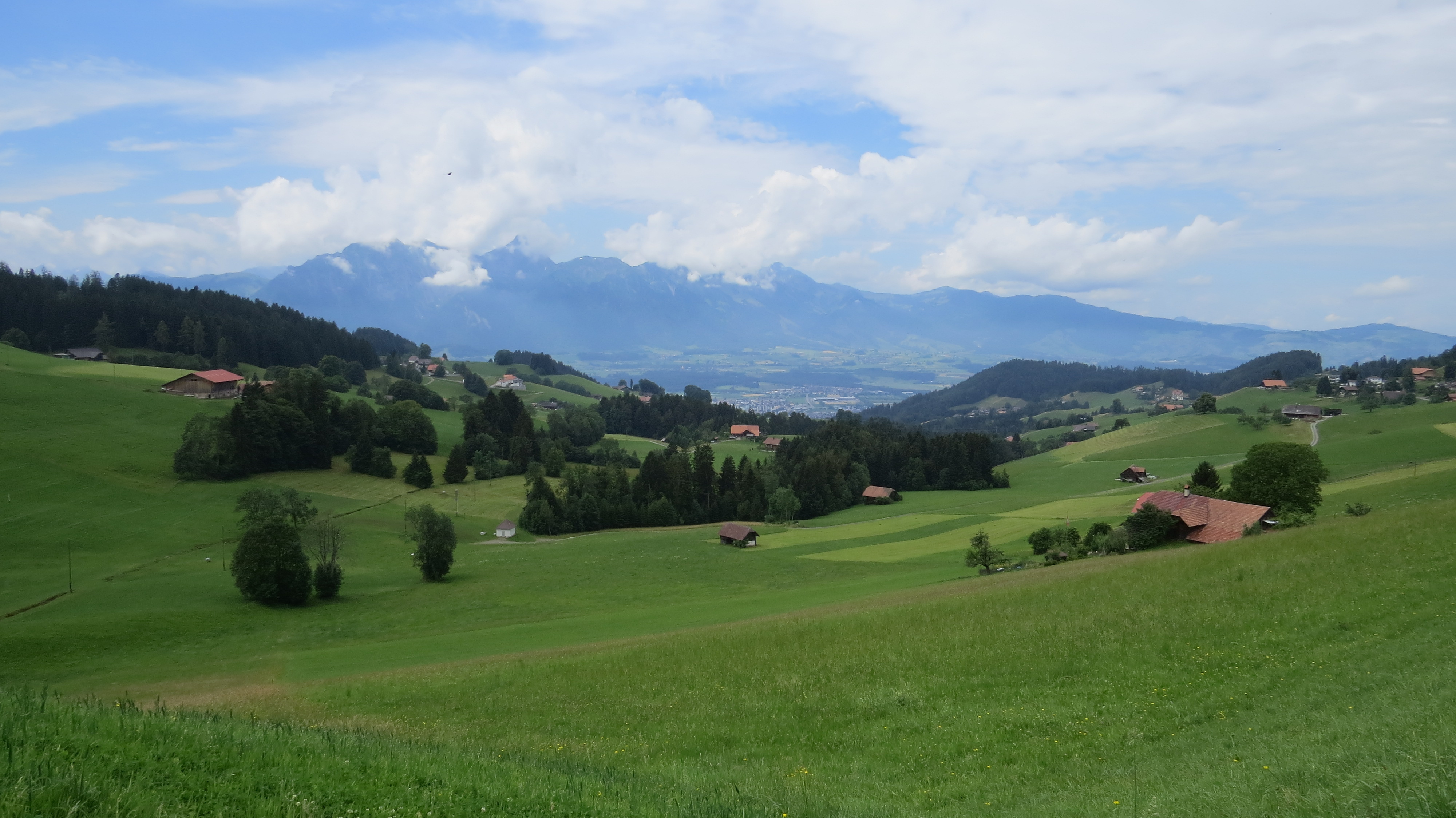 Heiligenschwendi gegen Stockhornkette